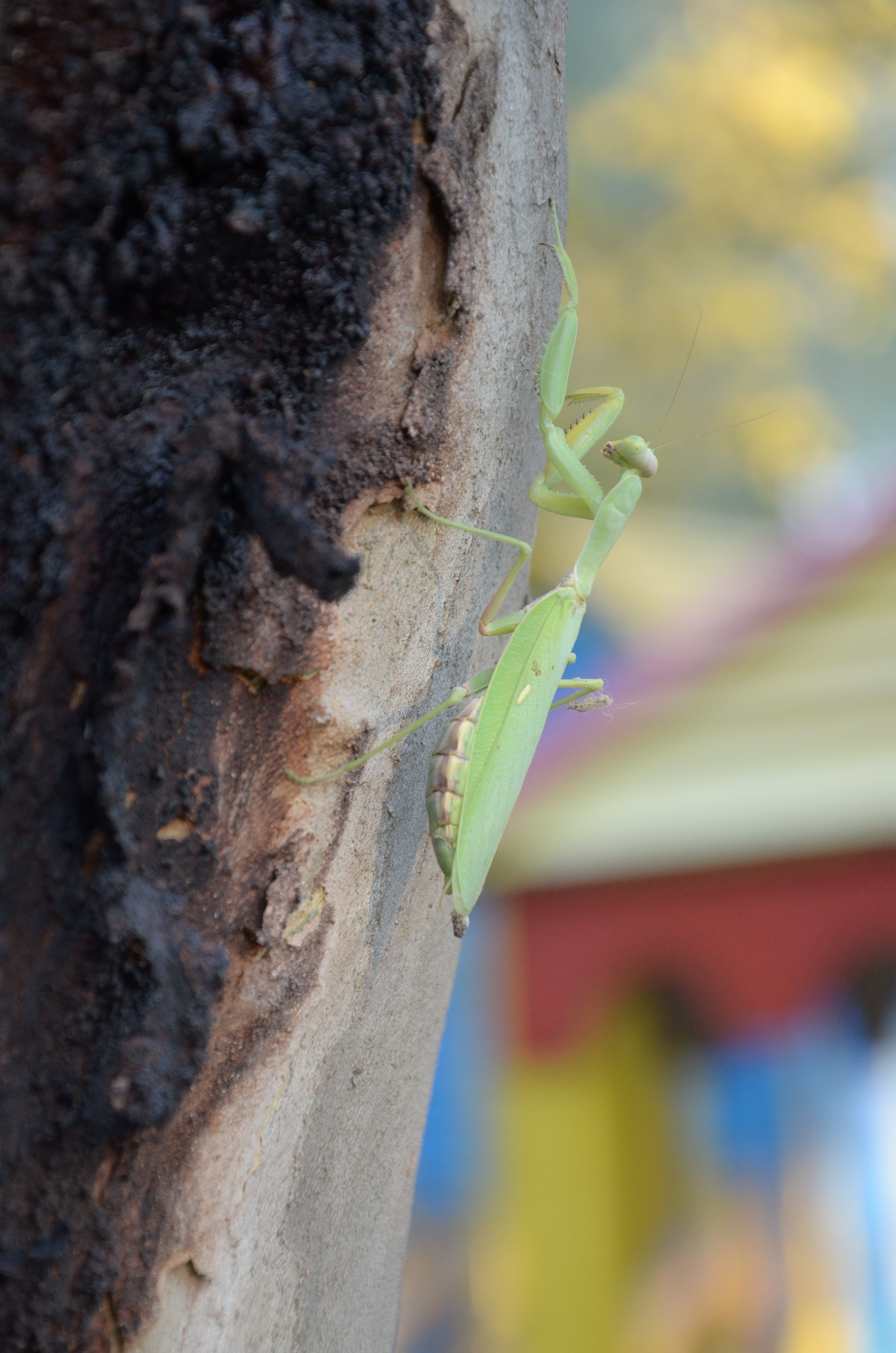 Сафари-парк в Краснодаре